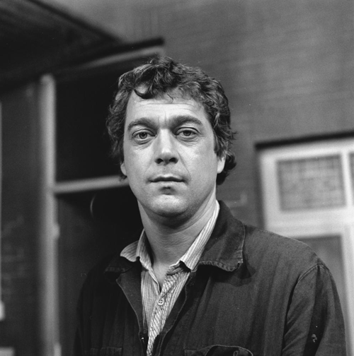 Joop Wittermans.